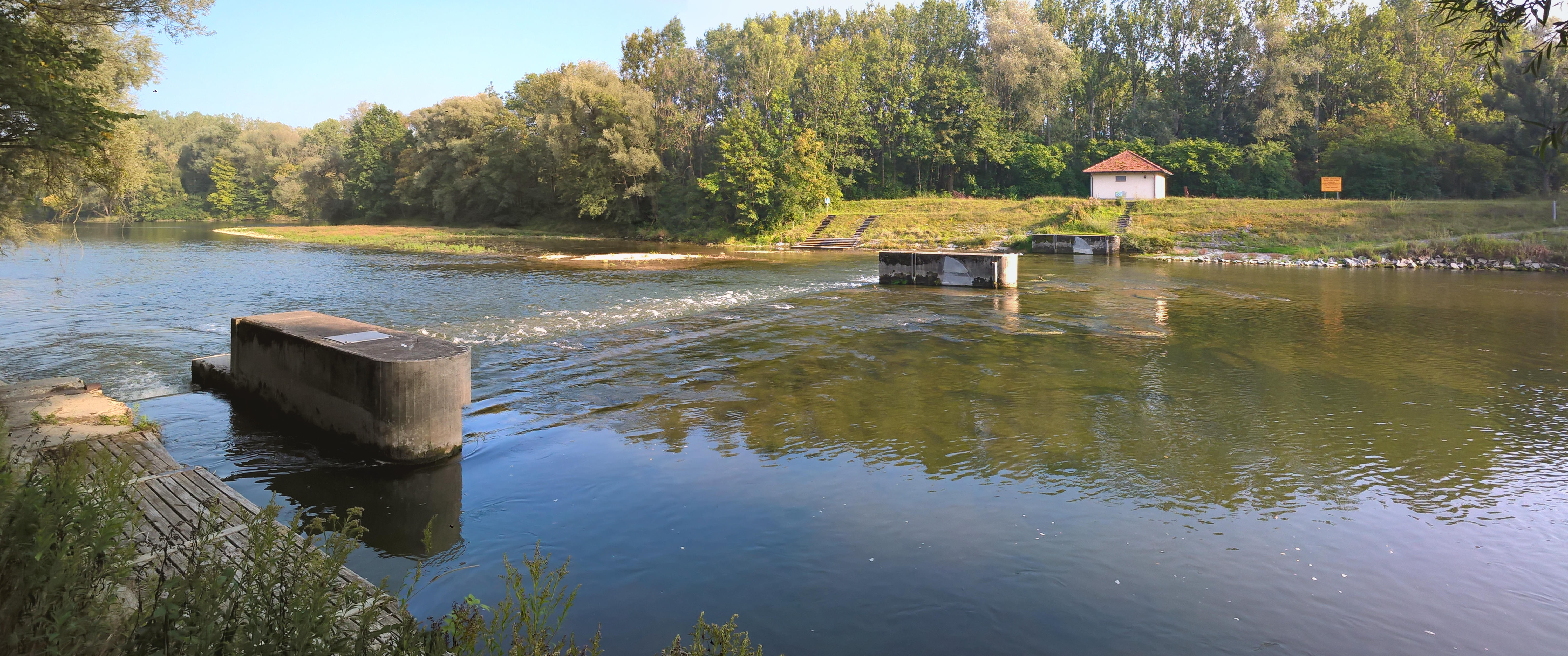 Stützschwelle Isar bei Kilometer 78,5